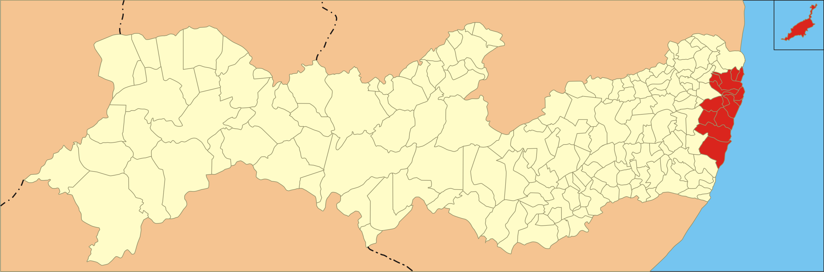 Localização da mesorregião no estado de Pernambuco.